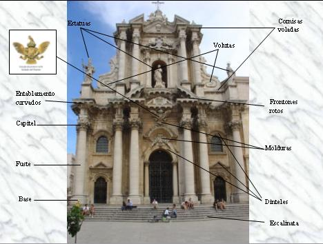 Aquí se aprecia en profundidad los detalles de la fachada de la catedral.